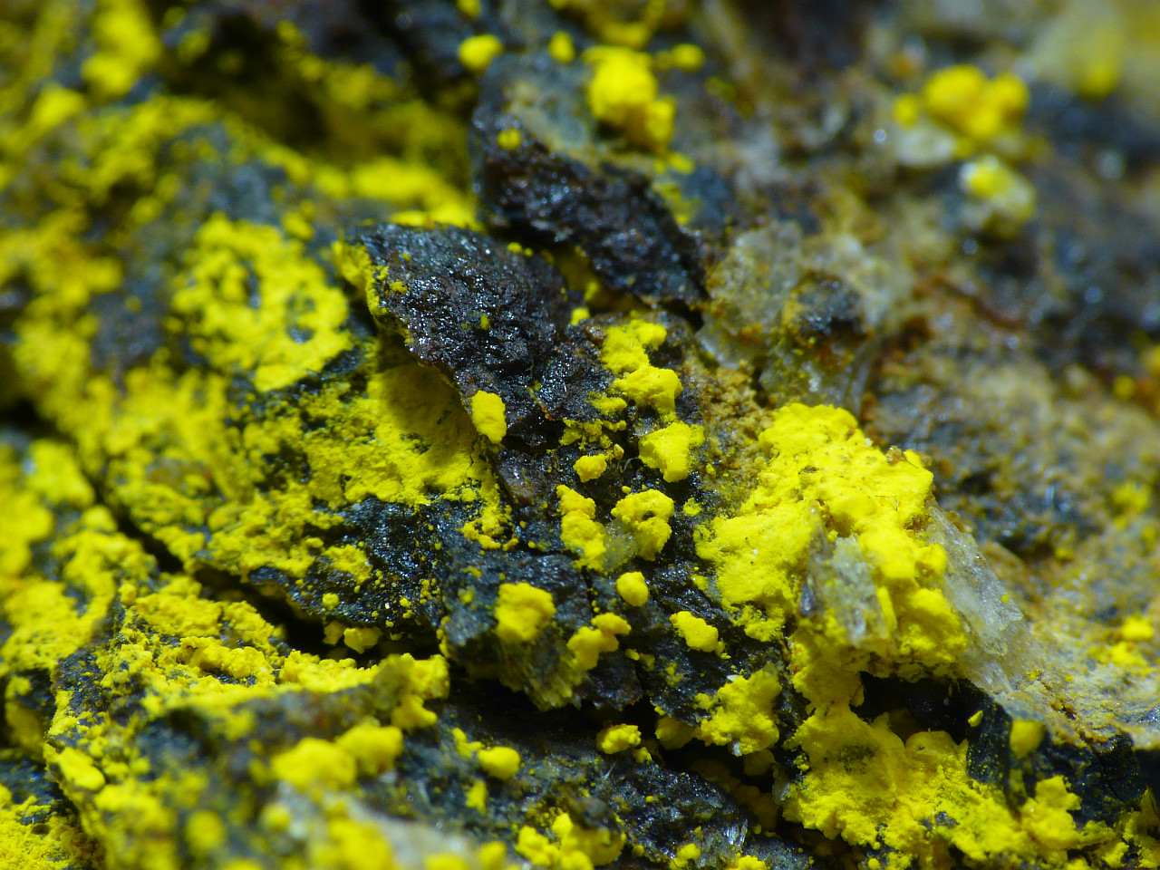 Na-Zippeite, Bukov Mine, Rozna, Tschechien, FOV: 6mm